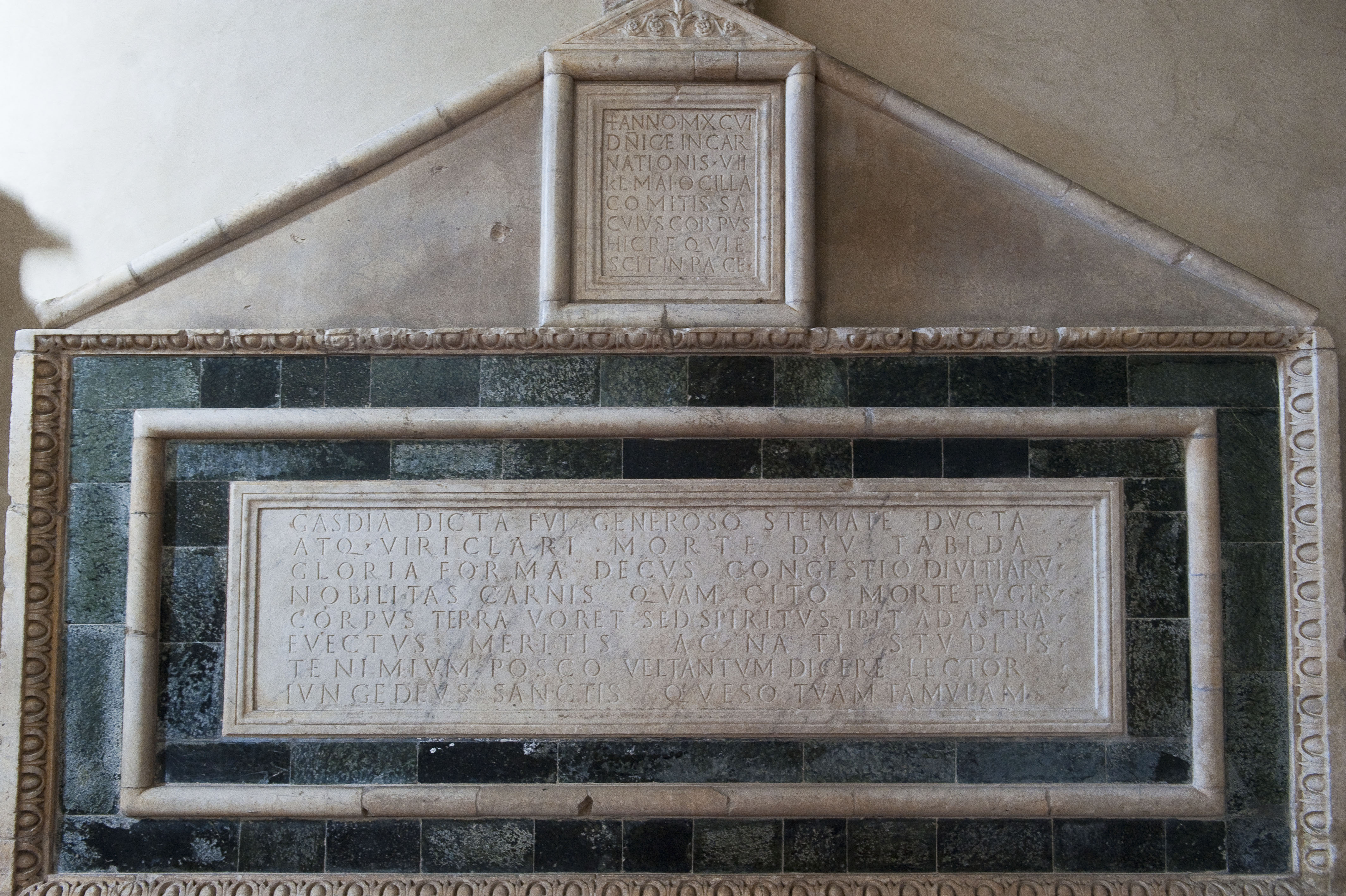 Sarcofago delle contesse Cadolinge Cilla e Gasdia (1096) - (Abbazia dei Santi Salvatore e Lorenzo a Settimo)